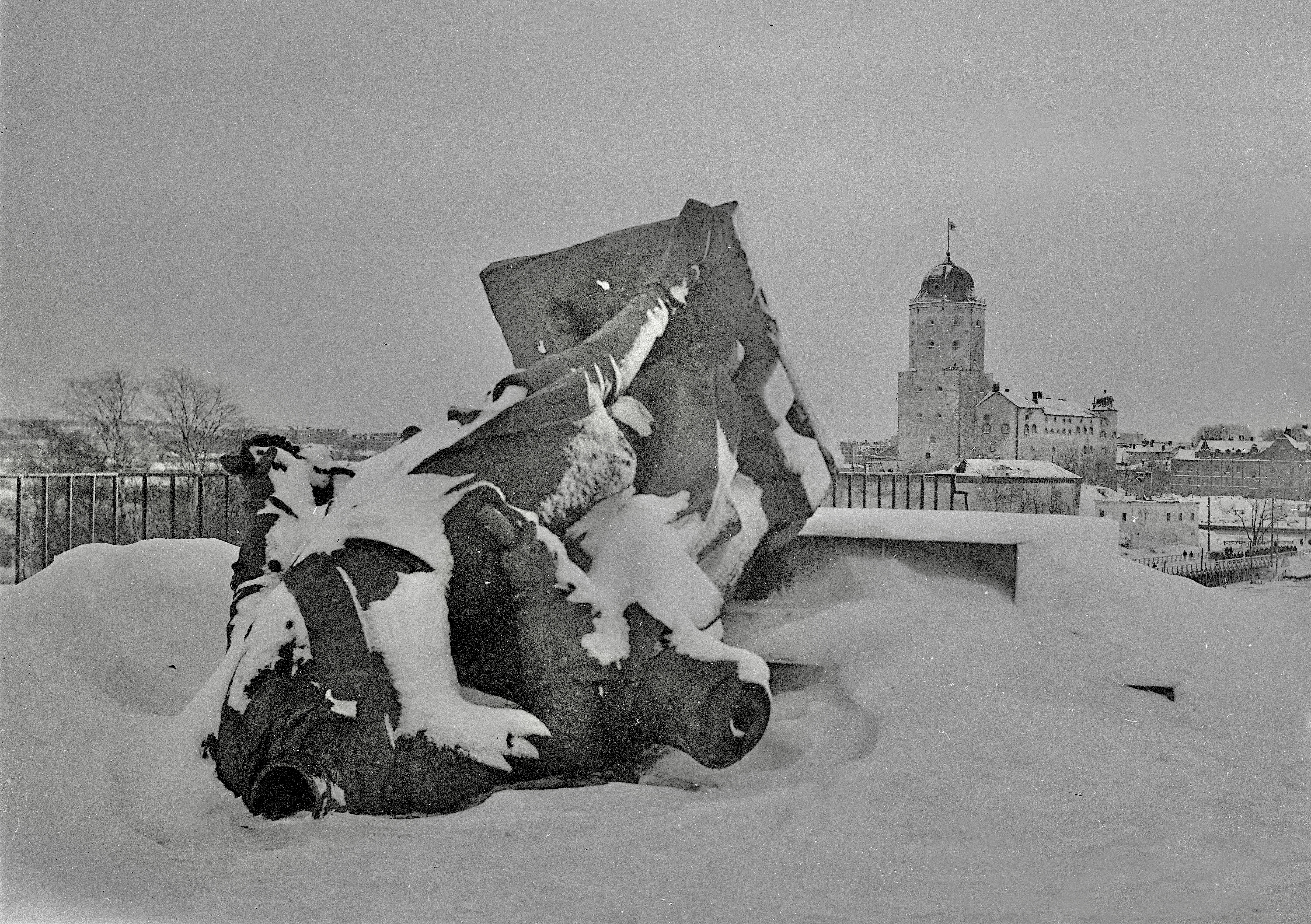 У памятника Петру Первому